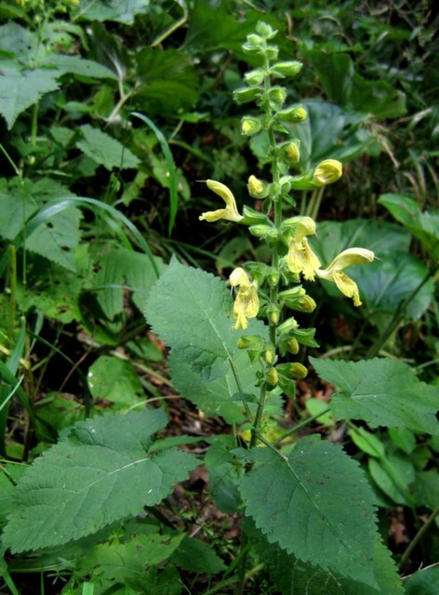 Leplijiva kadulja na Lučki Beli, Za loncem.